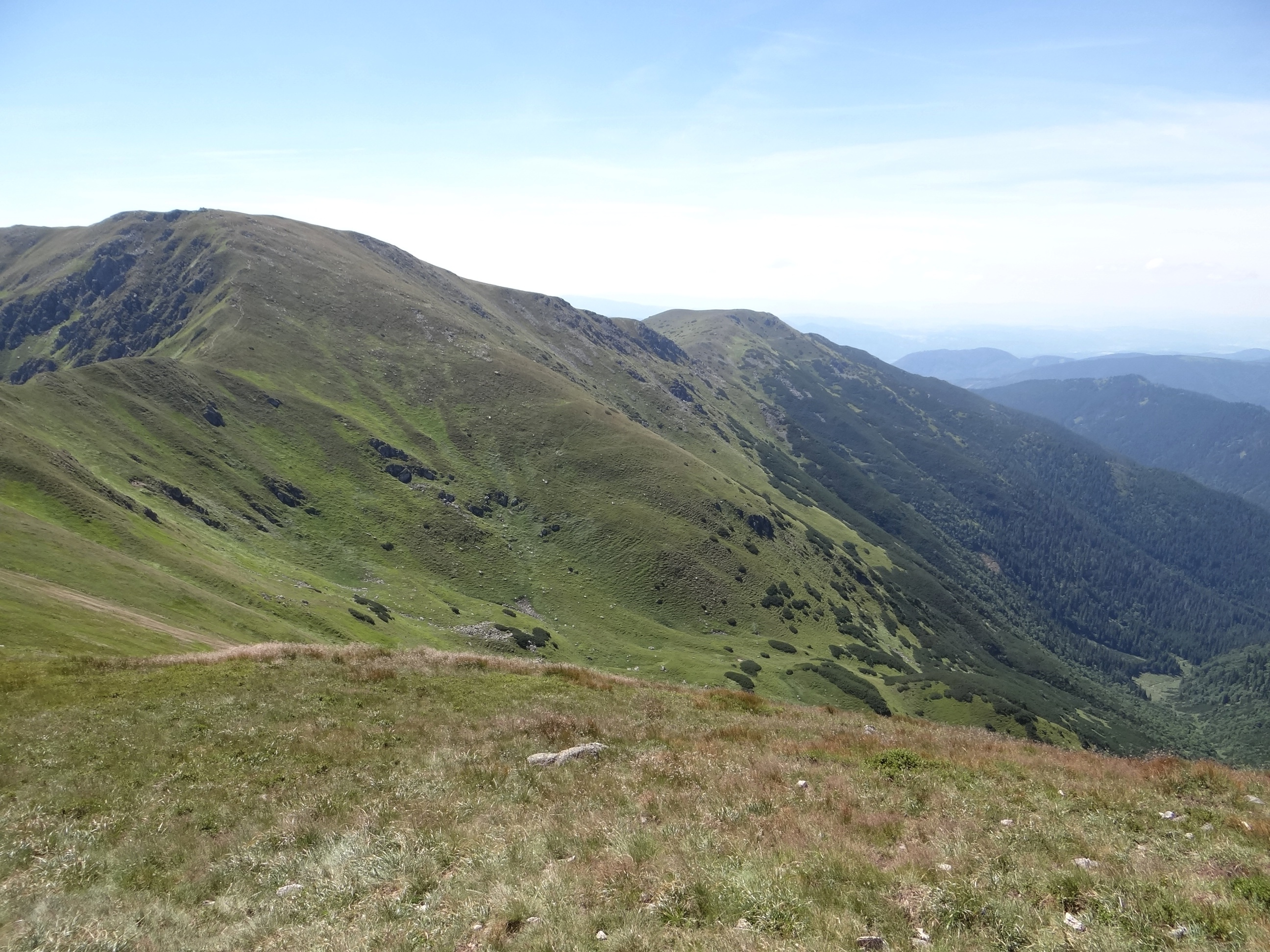 Skalka, Žiarska hoľa i Lomnistá dolina